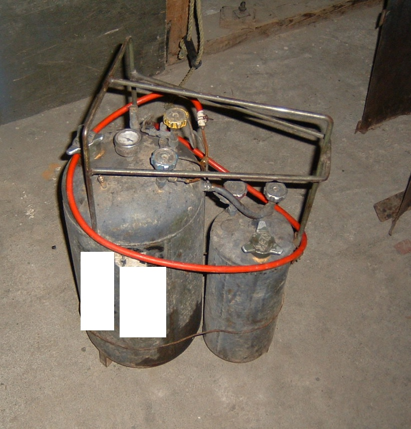 野外炊事の際に野戦釜で調理する際に必要な高圧タンク、バーナーに取り付け、小さい方にガソリン・大きい方に灯油を入れて混合させて使用していたそうです。